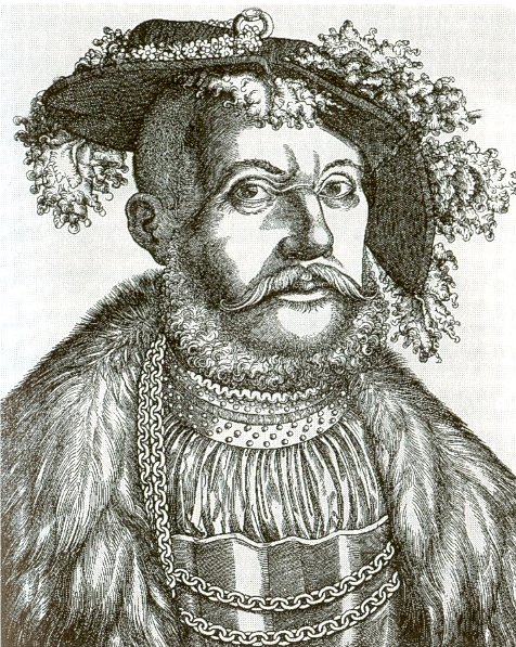 Herzog Ulrich von Württemberg (1487 - 1550) Landesbildstelle Württemberg, Stuttgart